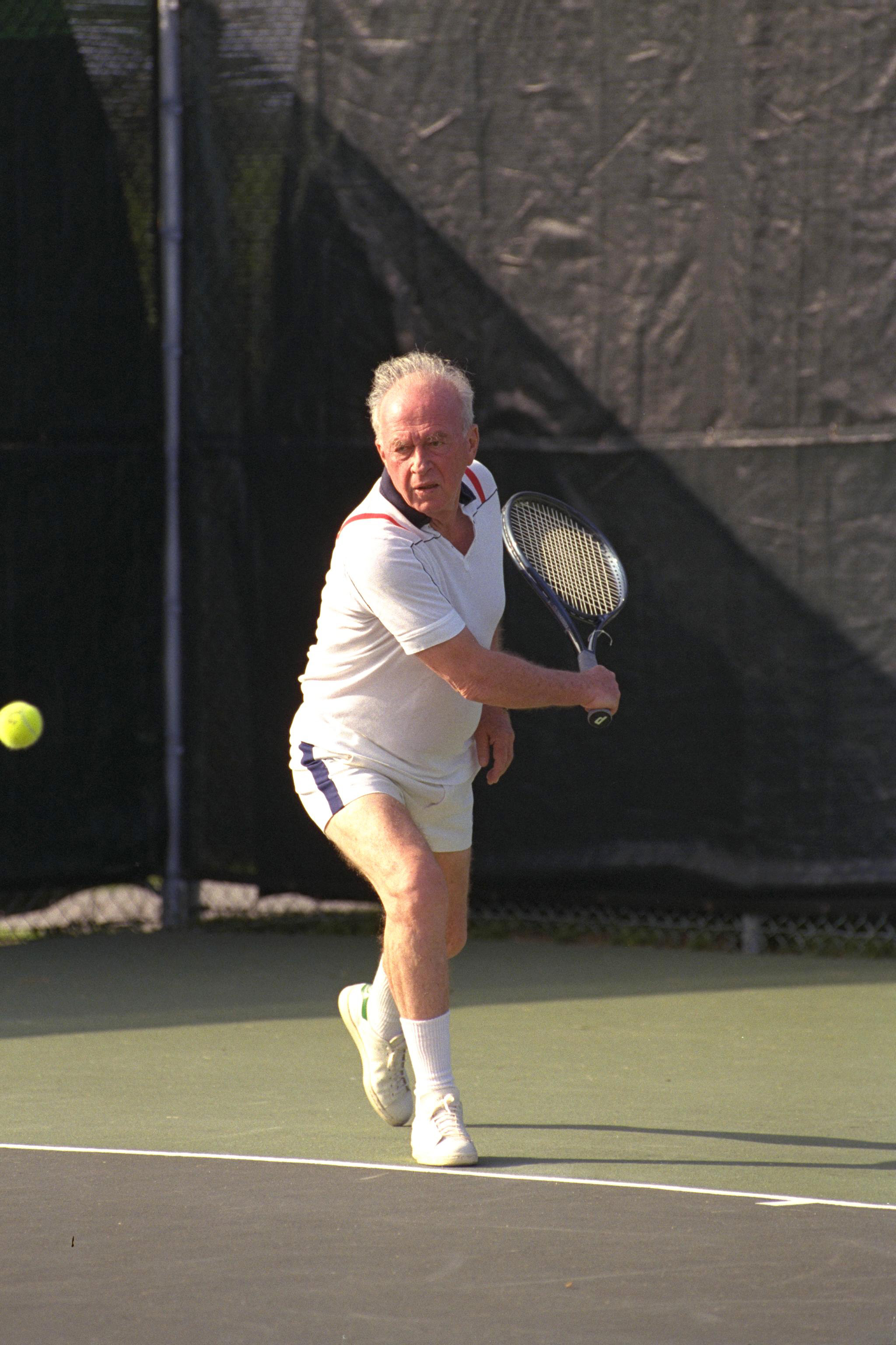 PRIME MINISTER YITZHAK RABIN PLAYING TENNIS IN KENNEBUNKPORT, MAINE, USA. Photograph, ראש הממשלה יצחק רבין משחק טניס, עת ביקורו במעונו של נשיא ארהב ג'ורג' בוש בקניבנקפורט שבמדינת מיין. Photo: SAAR YAACOV, GPO, 10/08/1992.